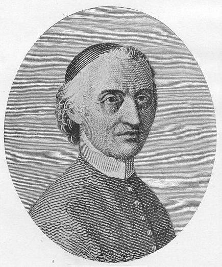 Egidio Forcellini (1688–1768), italienischer Altphilologe. Stich in der Lexikon-Ausgabe, London 1825 (Dr. John E. Sandys, Cambridge University Press)